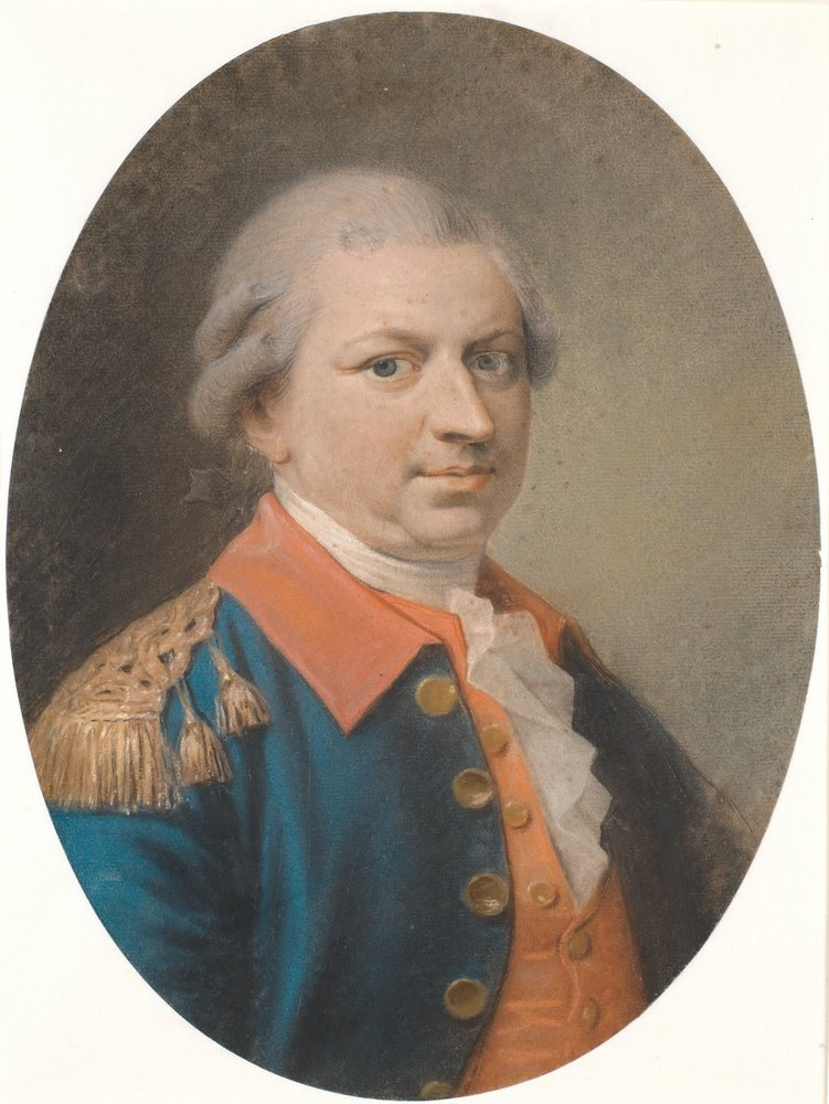 Henrik Gerner